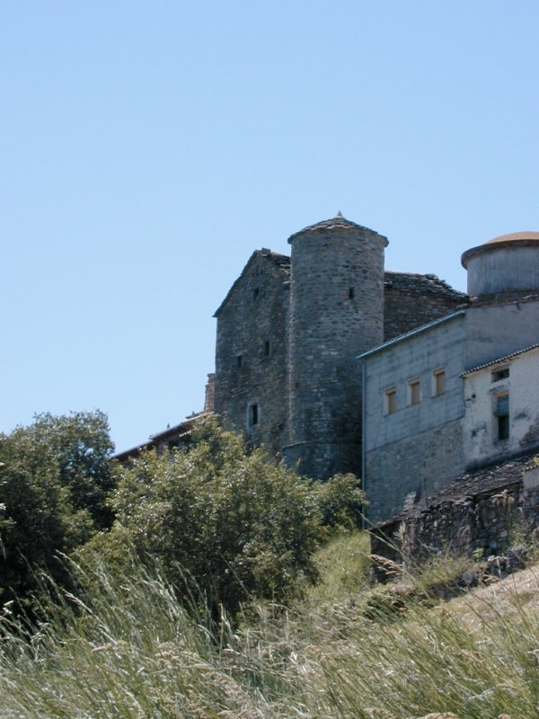 Vista de la torre de planta circular de casa La Abadía de Arro.